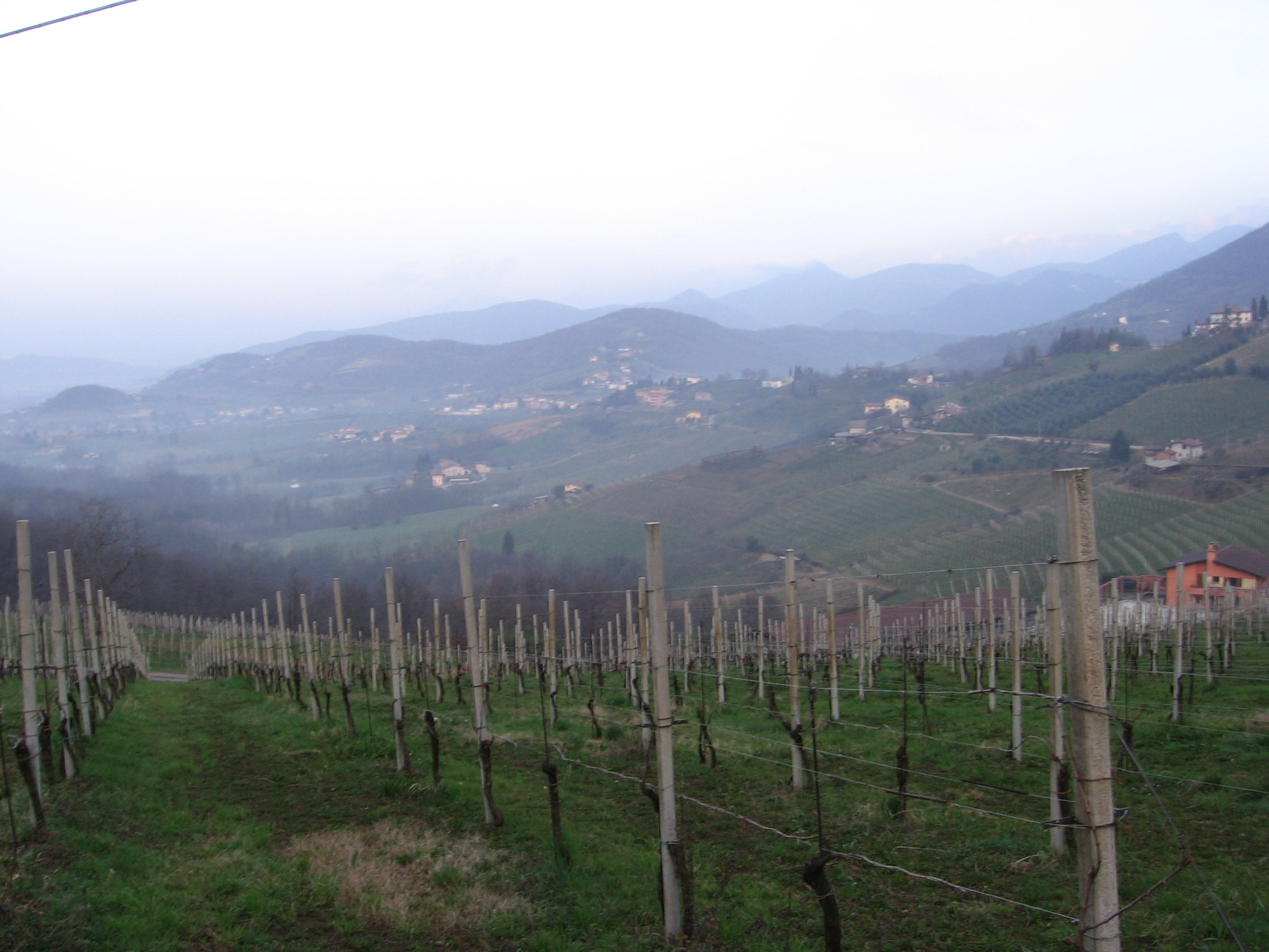 Vigneti, Scanzorosciate, Bergamo, Italy